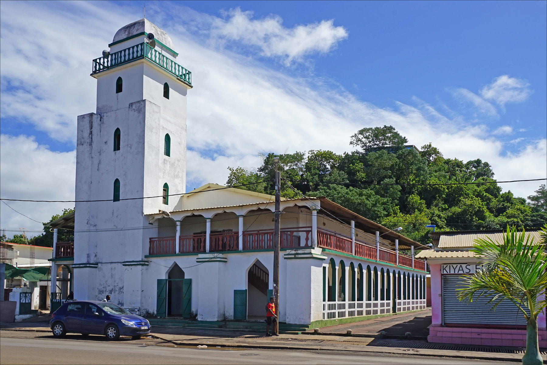 La population mahoraise pratique un Islam modéré, d'origine sunnite, selon la voie shafeïte kamania comme dans la plupart des pays du canal du Mozambique. Mosquée et école coranique organisent pratique et enseignement de la foi islamique, autour des autorités coutumières : "Fundi, Cheiha et Cadis"